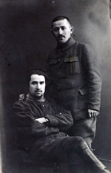 Mirsaid Sultangaliyev ve İsmail Kerimcanov Firdevs Rusya Komünist Partisi (Bolşevik) Kazan İl Komitesi'nde 1919